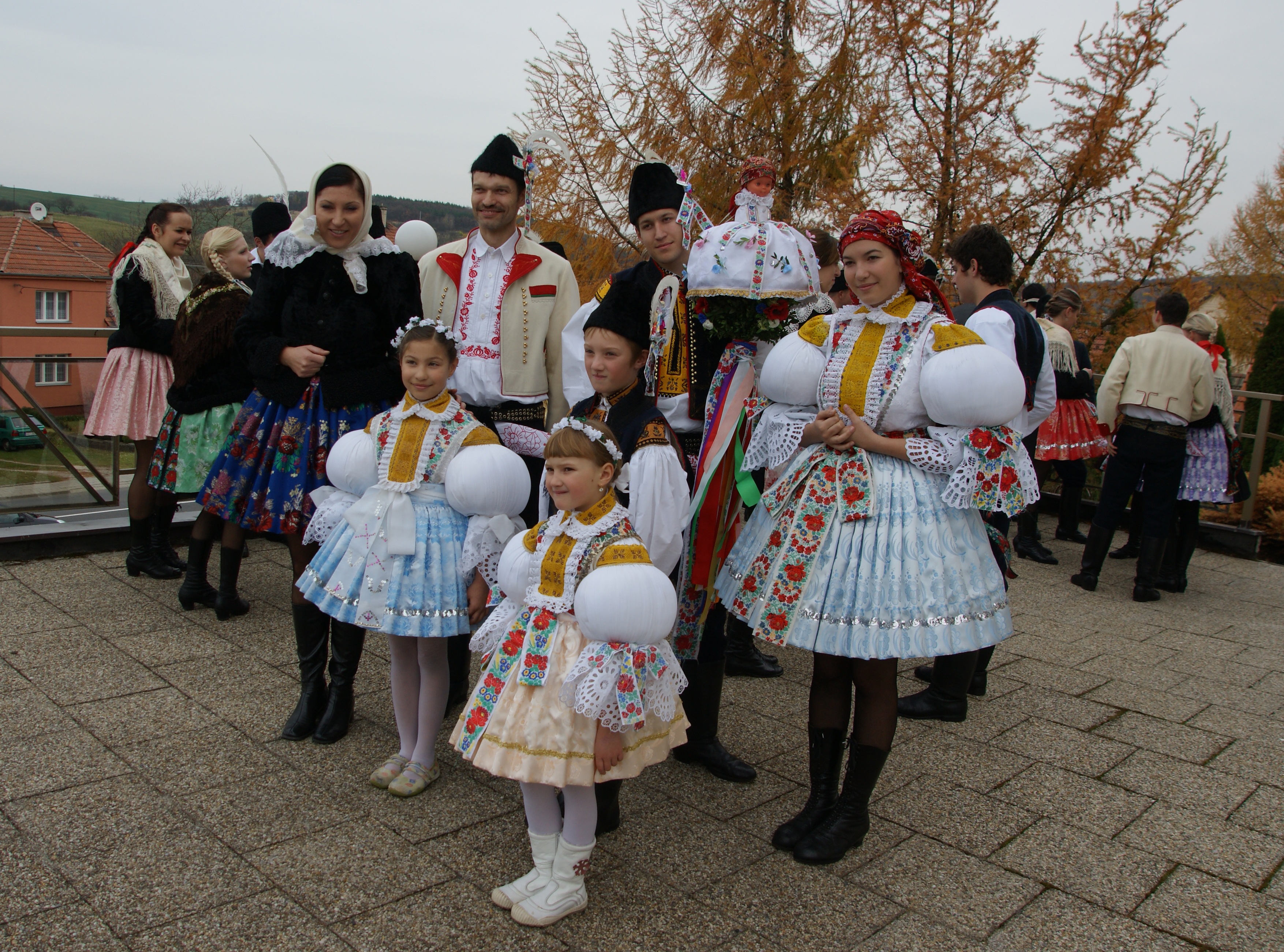 Ukázka sedlckého, slavnostního a dětského kroje. Martinské hody Nedachlebice 2010.